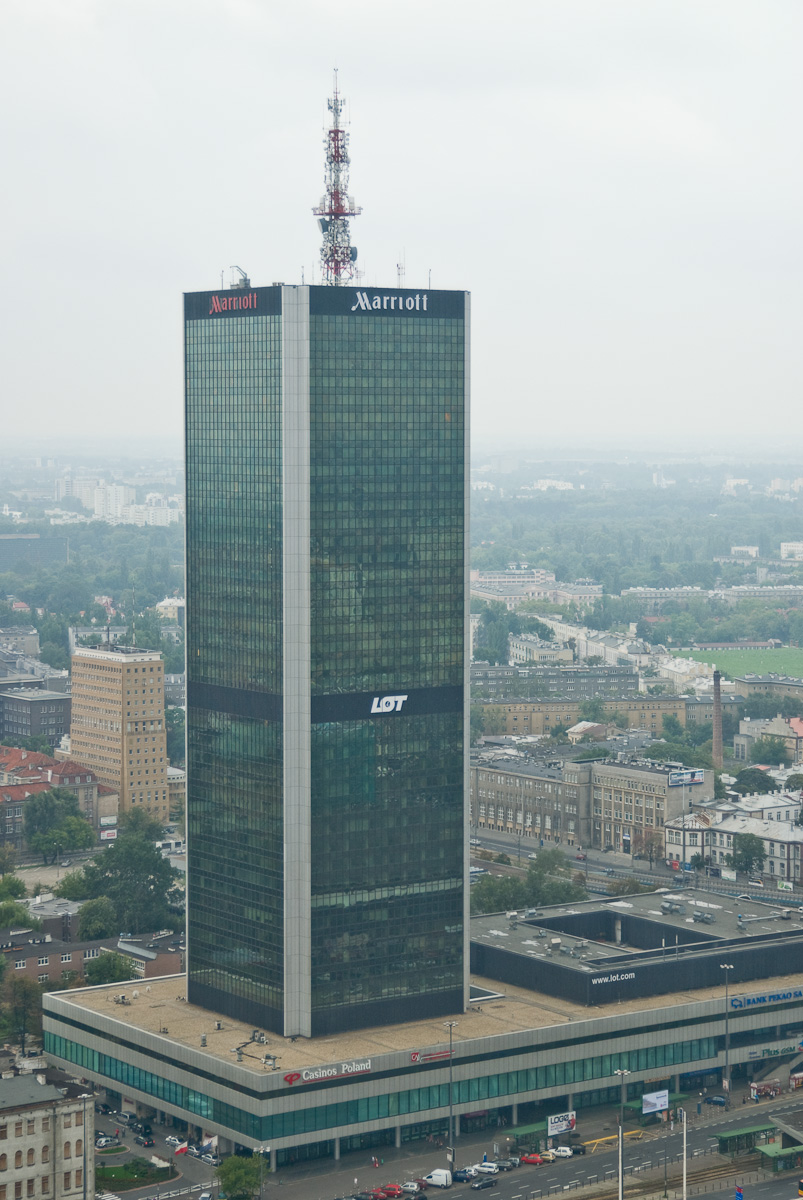 Hotel Marriott, Warsaw Poland